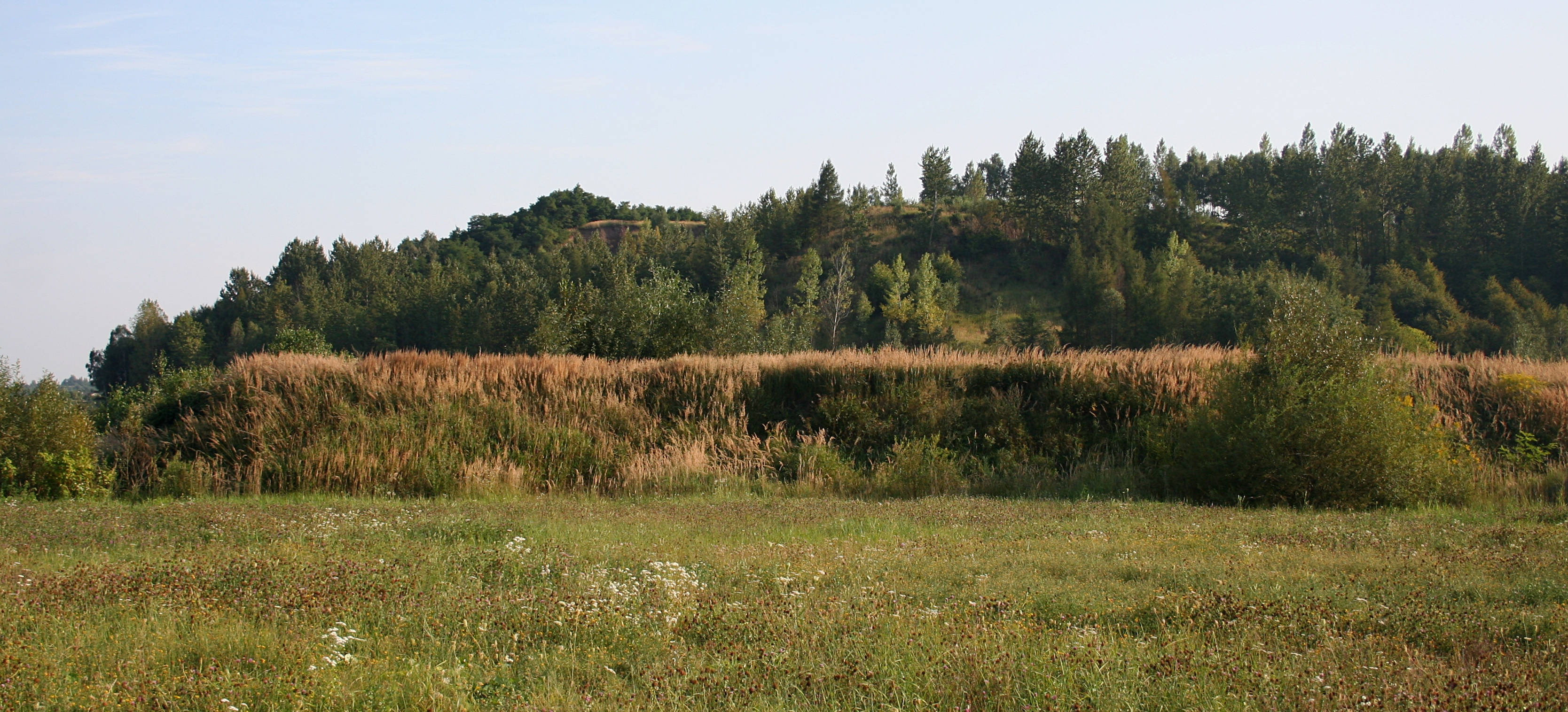 Częstochowa, hałda w Dźbowie, 291 m n.p.m.